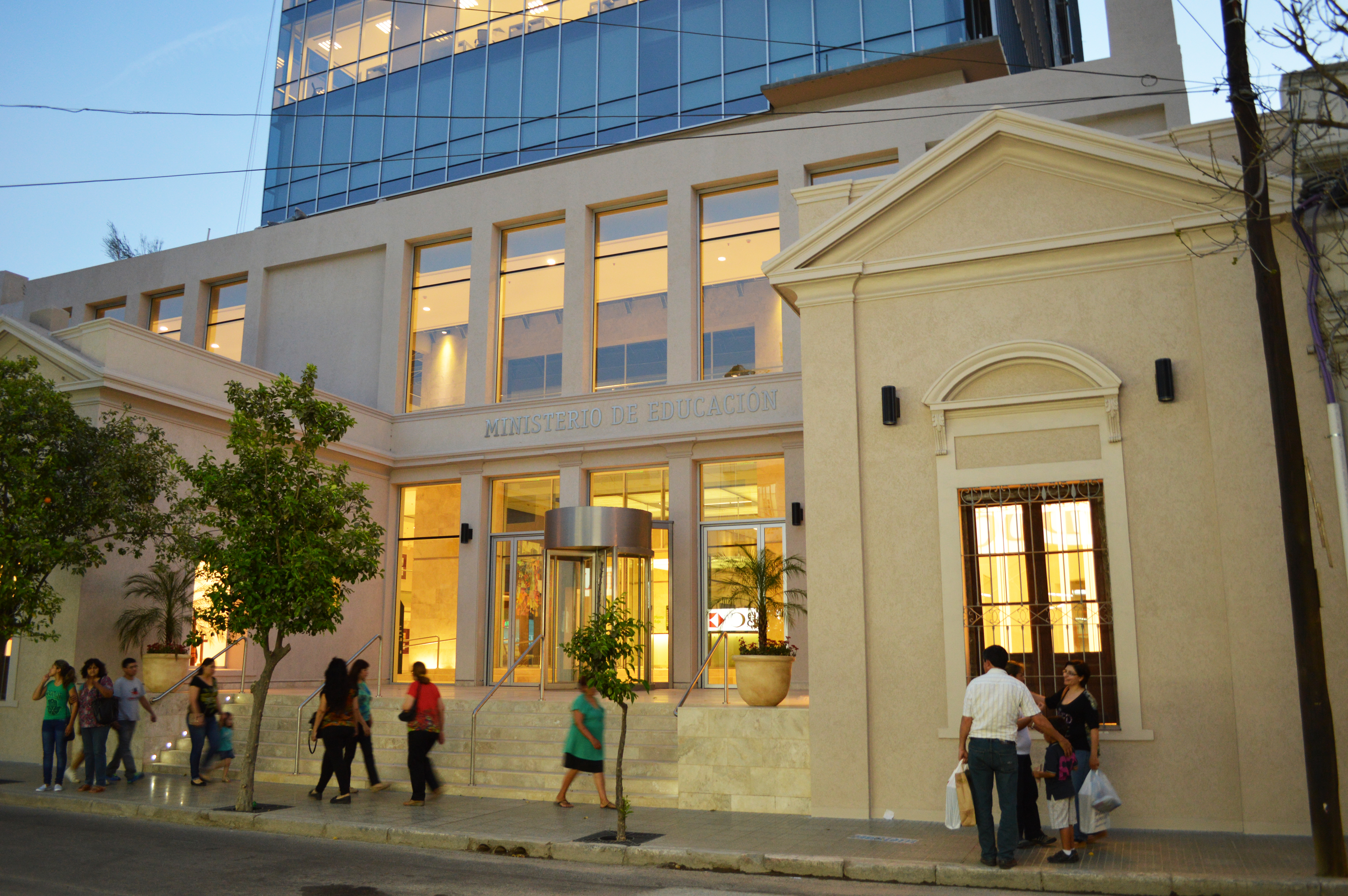 Ingreso al Complejo Juan Felipe Ibarra sobre calle 24 de Septiembre. Presenta en su ingreso la fachada histórica de la antigua escuela inaugurada por el gobernador Manuel Taboada en el año 1880. Queda vinculado con Avenida Belgrano a través de una calle interna a modo de Paseo Cultural.